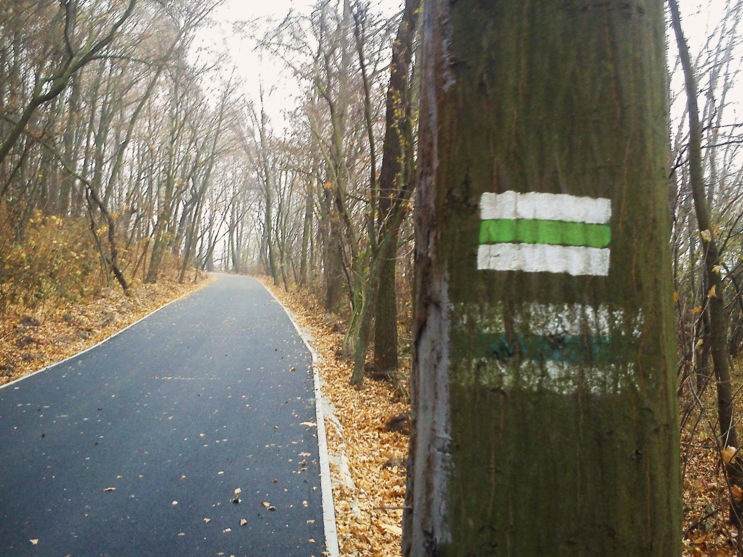 Nad Jeziorem street, Poznań. Kierskie Lake.